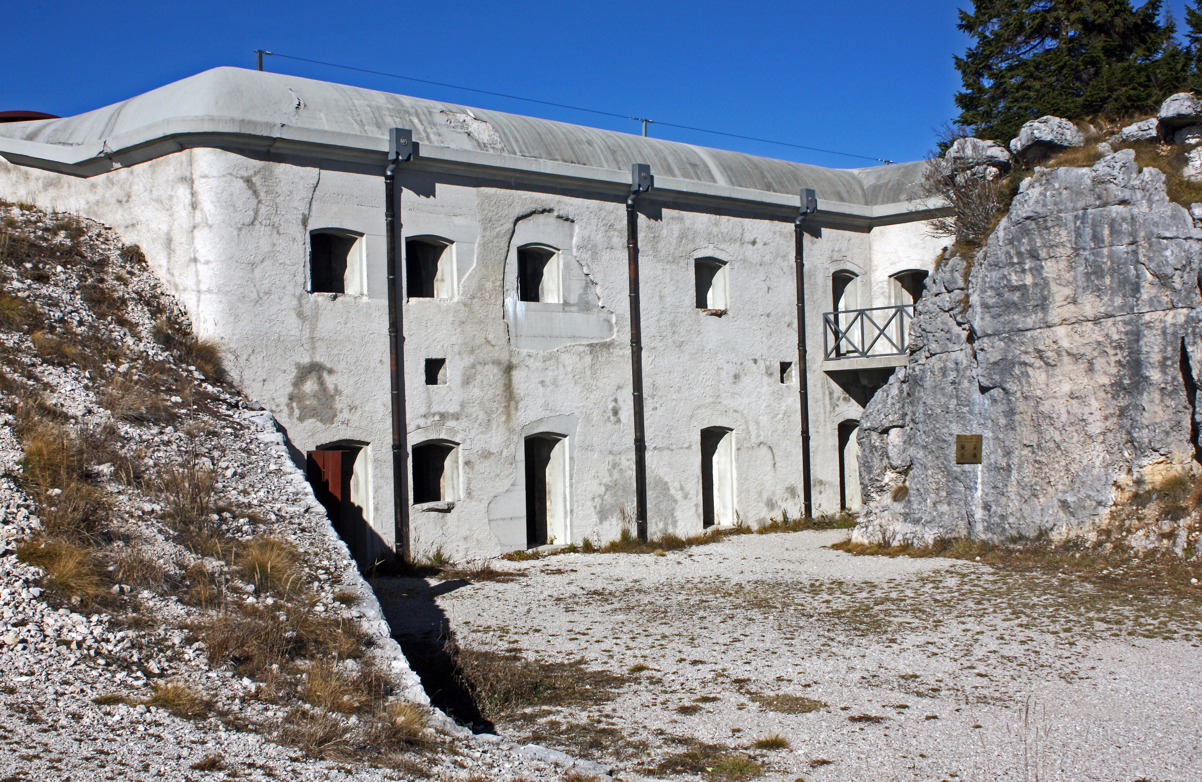 Forte Campolongo nach der Restaurierung